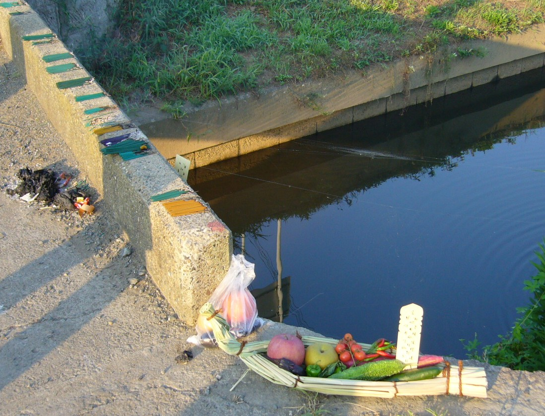 bon-hune,syourou-bune,katori-city,japan